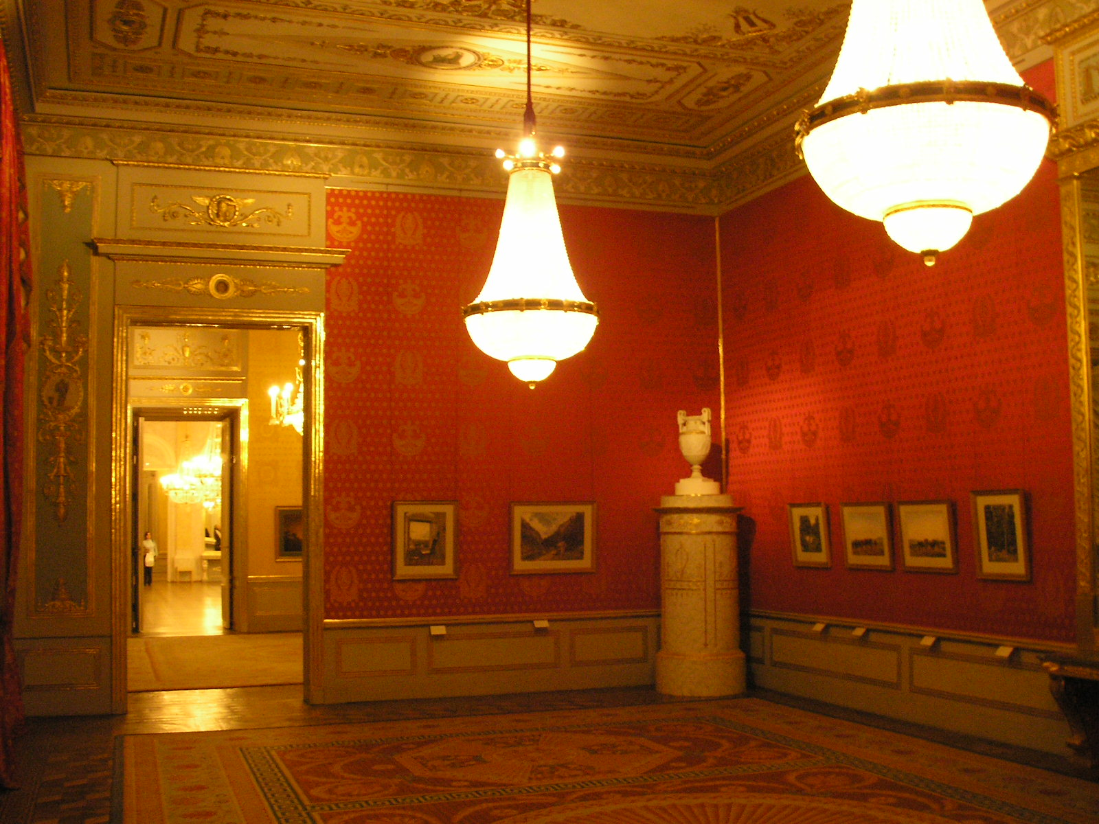 The Albertina, former Palais Erzherzog Albrecht, in Vienna - Audience chamber.